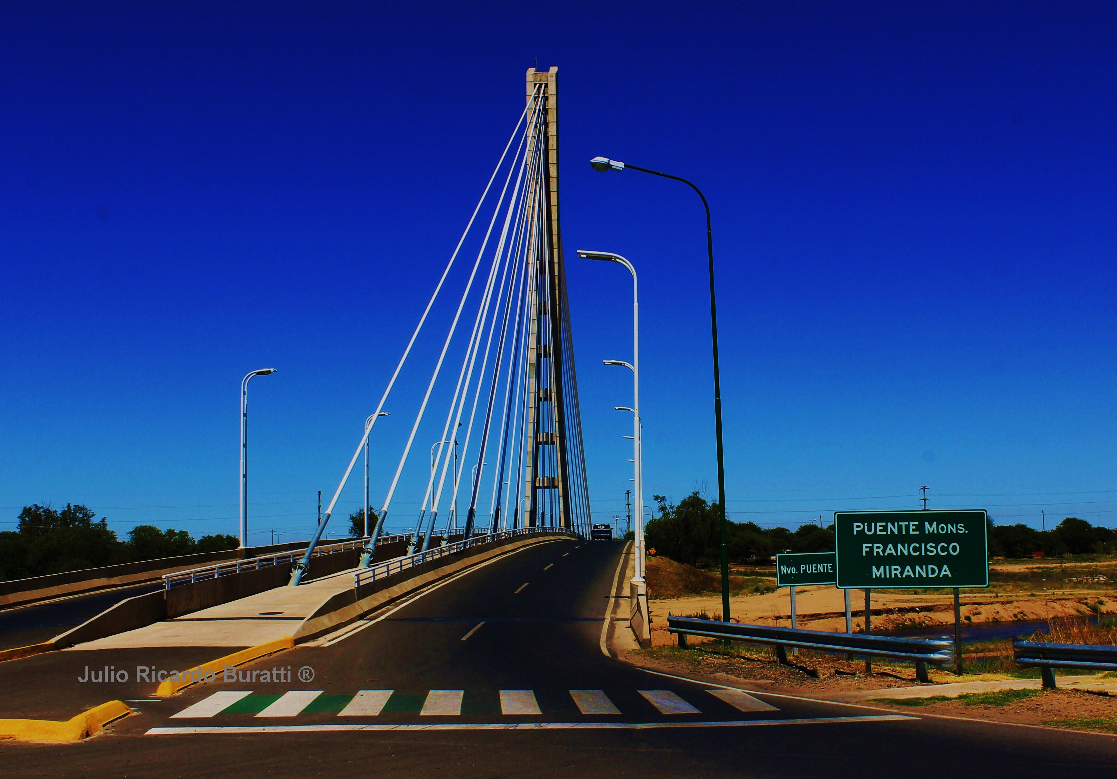 Puente Colgante Monseñor Francisco Miranda. Villa Mercedes.